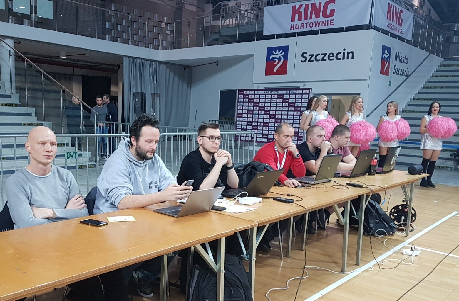 Media podczas derbów w Szczecinie (20.01.2019)